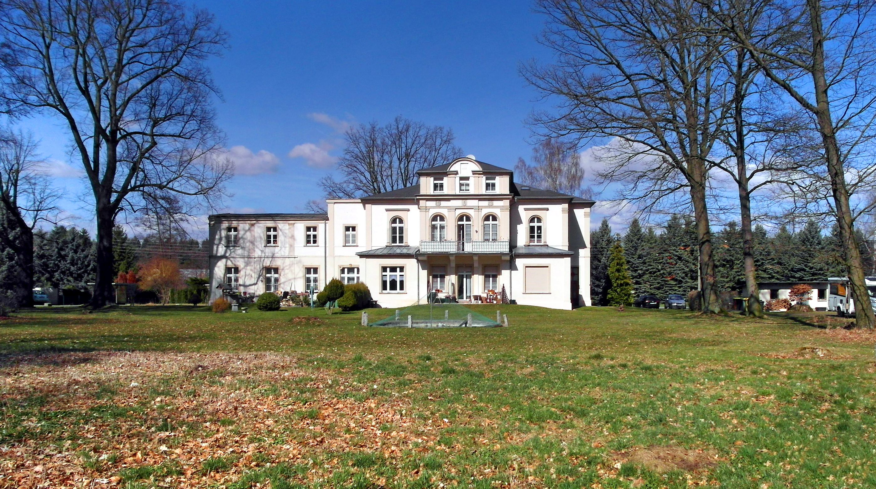 26.03.2017 02708 Kleinschweidnitz (Großschweidnitz), Thomas-Müntzer-Straße 9: Das neue Herrenhaus entstand im 19. Jh. unter Carl August Mosig von Aehrenfeld. Heute Mehrfamilienhaus in Privatbesitz. Parkseite. [SAM8658.JPG]20170326200DR.JPG(c)Blobelt